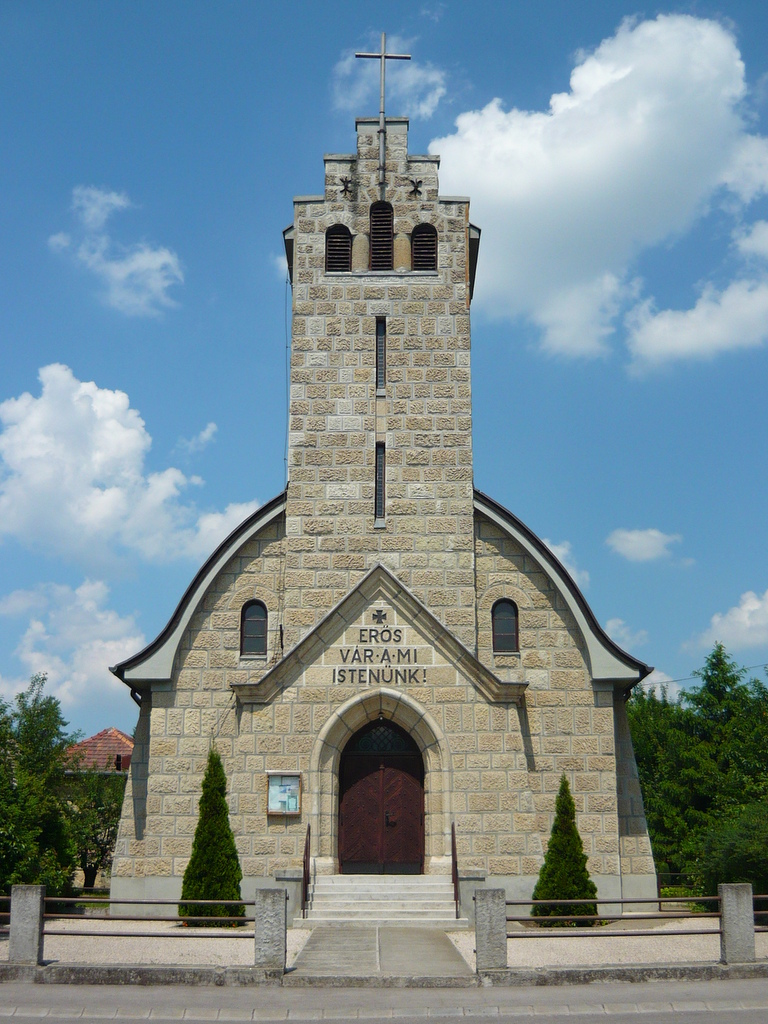 cropped from File:Rakosligeti evangelikus templom2.jpg